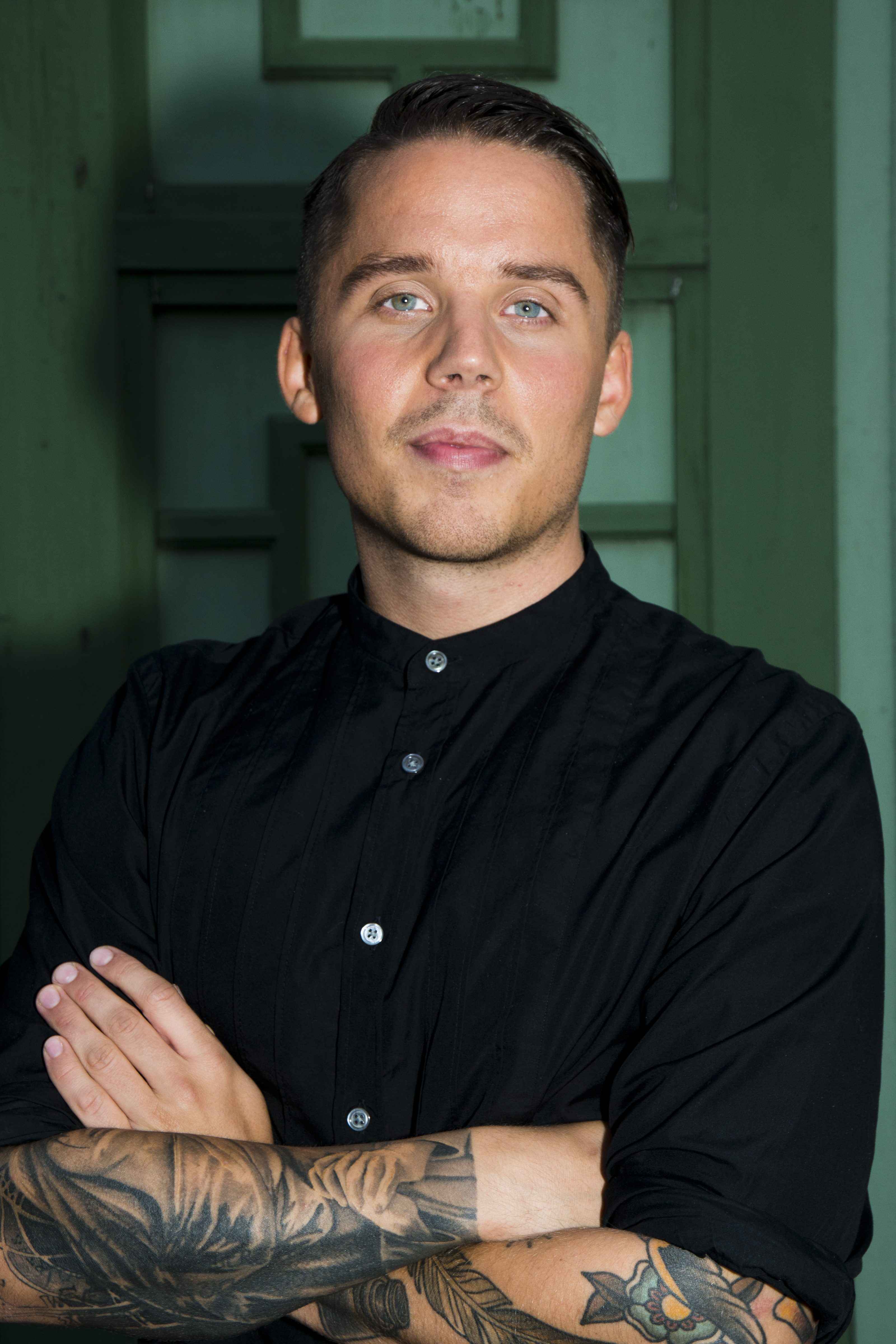 Albin Johnsén på Sommarkrysset, Gröna Lund i Stockholm